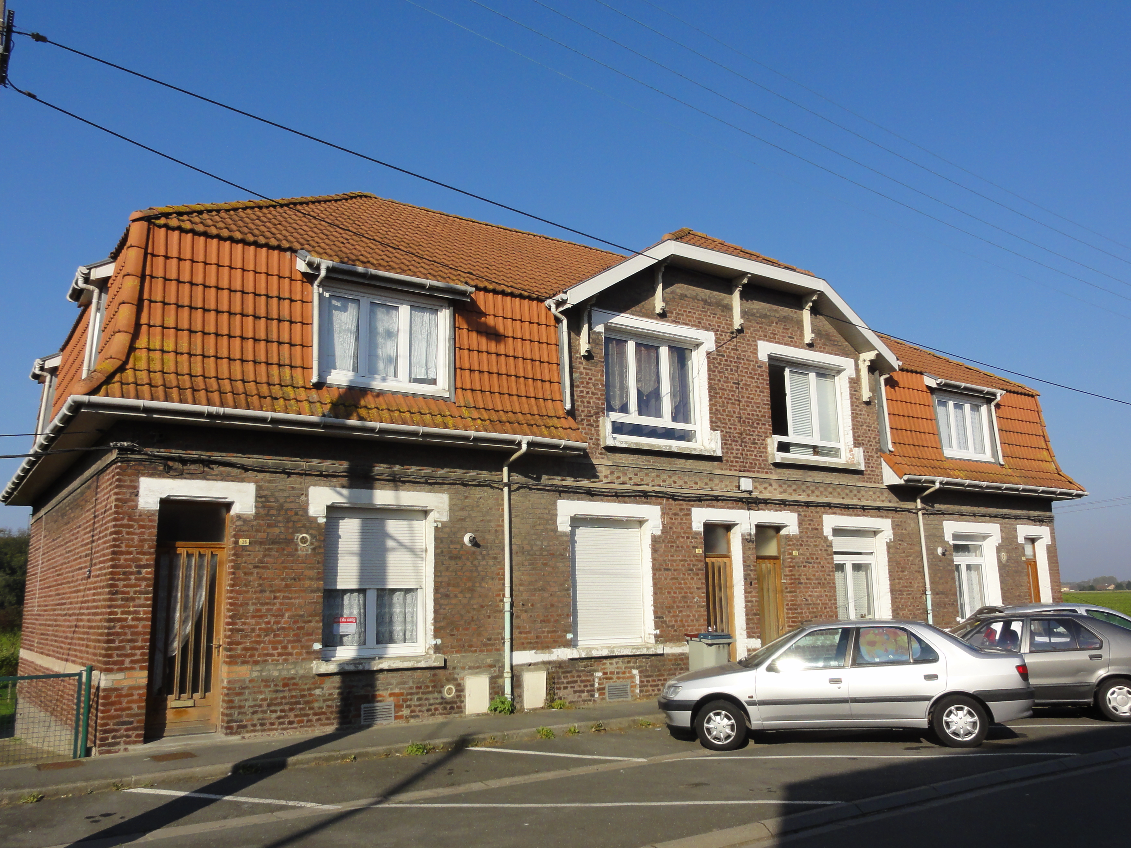 Cité des Vieux-Corons, en grande partie détruite, de la fosse n° 1 de la Compagnie des mines de Meurchin puis de Lens dans le bassin minier du Nord-Pas-de-Calais, Bauvin, Nord, Nord-Pas-de-Calais, France.